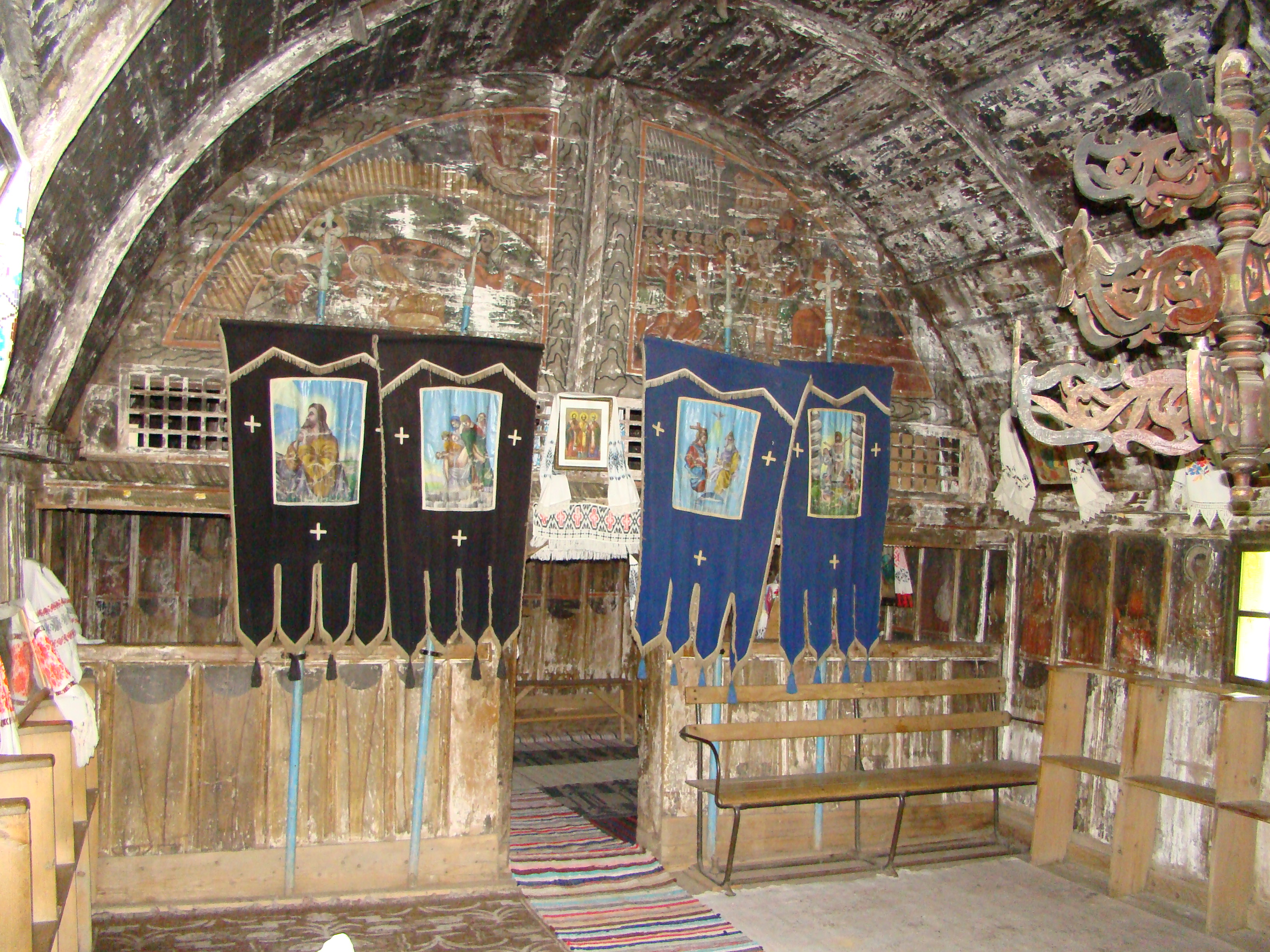 Biserica de lemn din Sărmășel-Gară